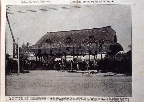 日治時代的北門車站，本建築於1923年拆除。